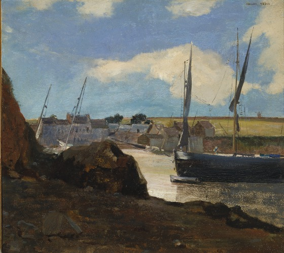 Le Port de Morgattitle QS:P1476,fr:"Le Port de Morgat" label QS:Lfr,"Le Port de Morgat"